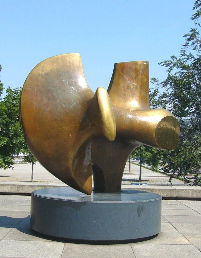 Moore: The Archer (der Bogenschütze), 1966, Berlin /Germany(GNU-FDL, das Kunstwerk ist dauerhaft an einem öffentlichen Platz aufgestellt. Foto selbst erstellt.)